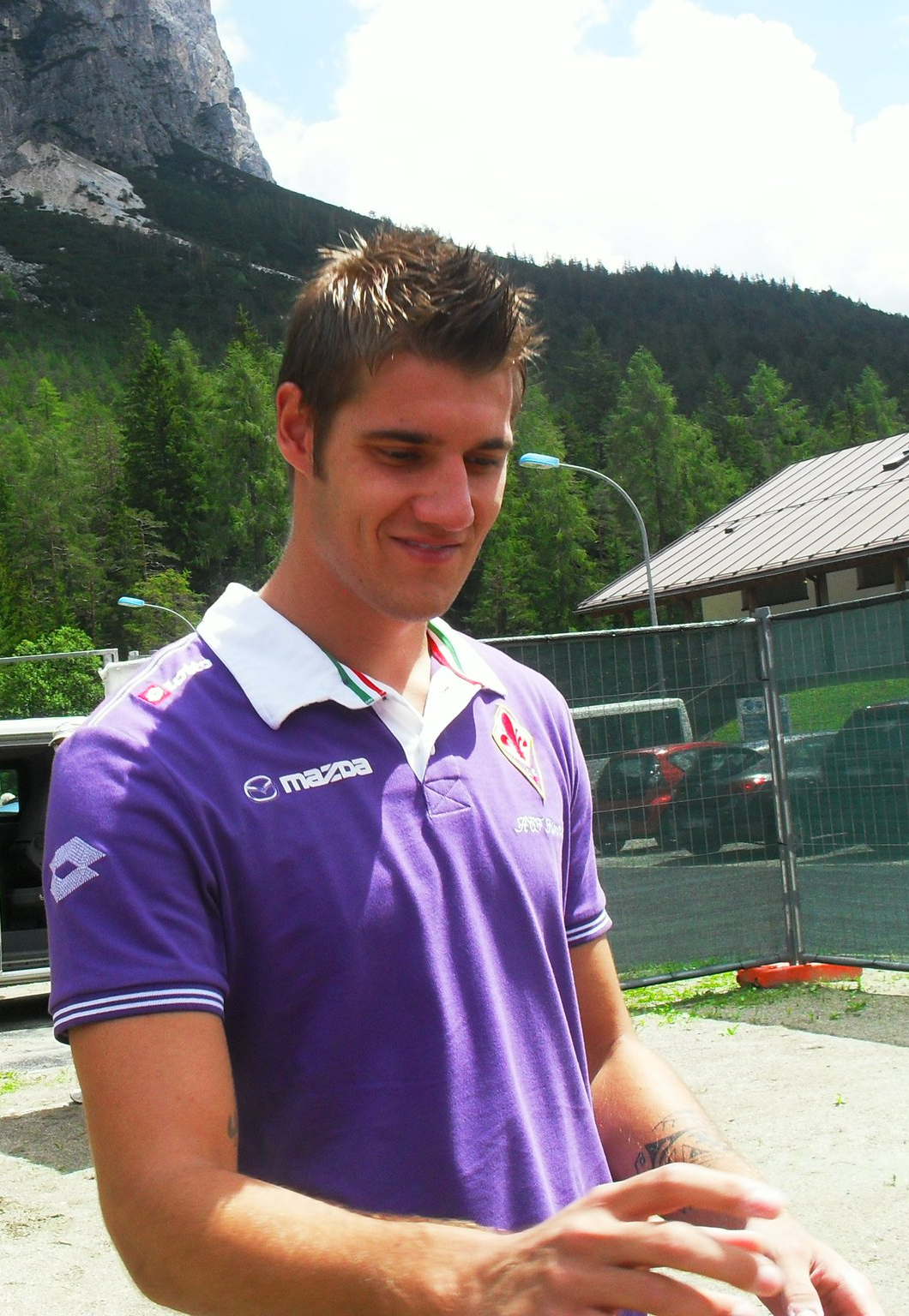 Andrea Seculin mentre firma gli autografi